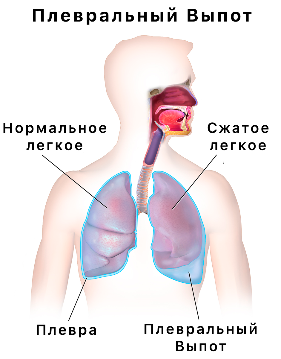 Плевральный Выпот, Схема